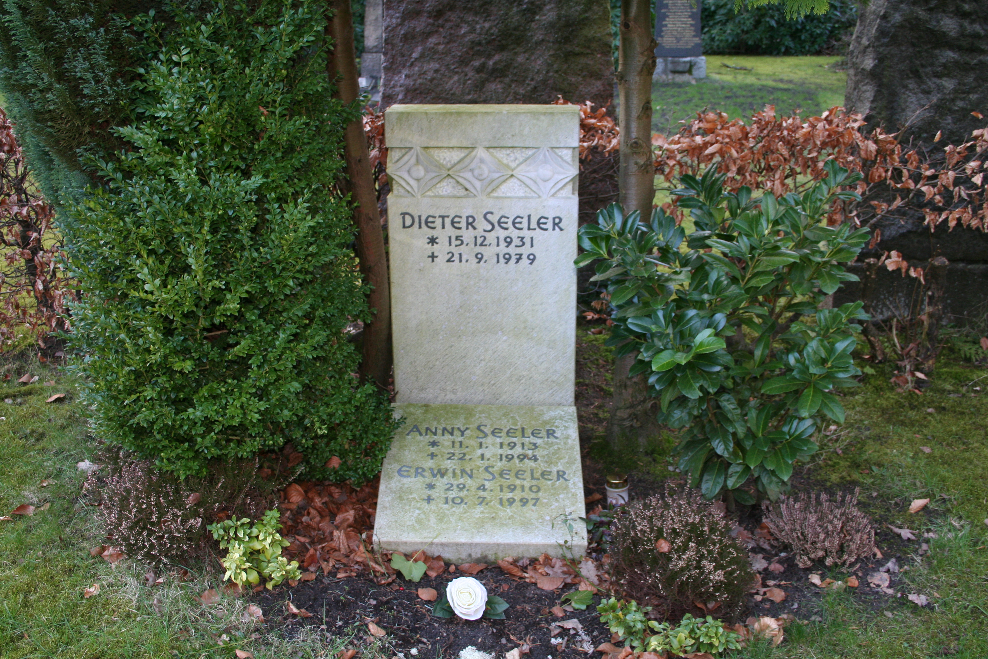 Familiengrab Seeler